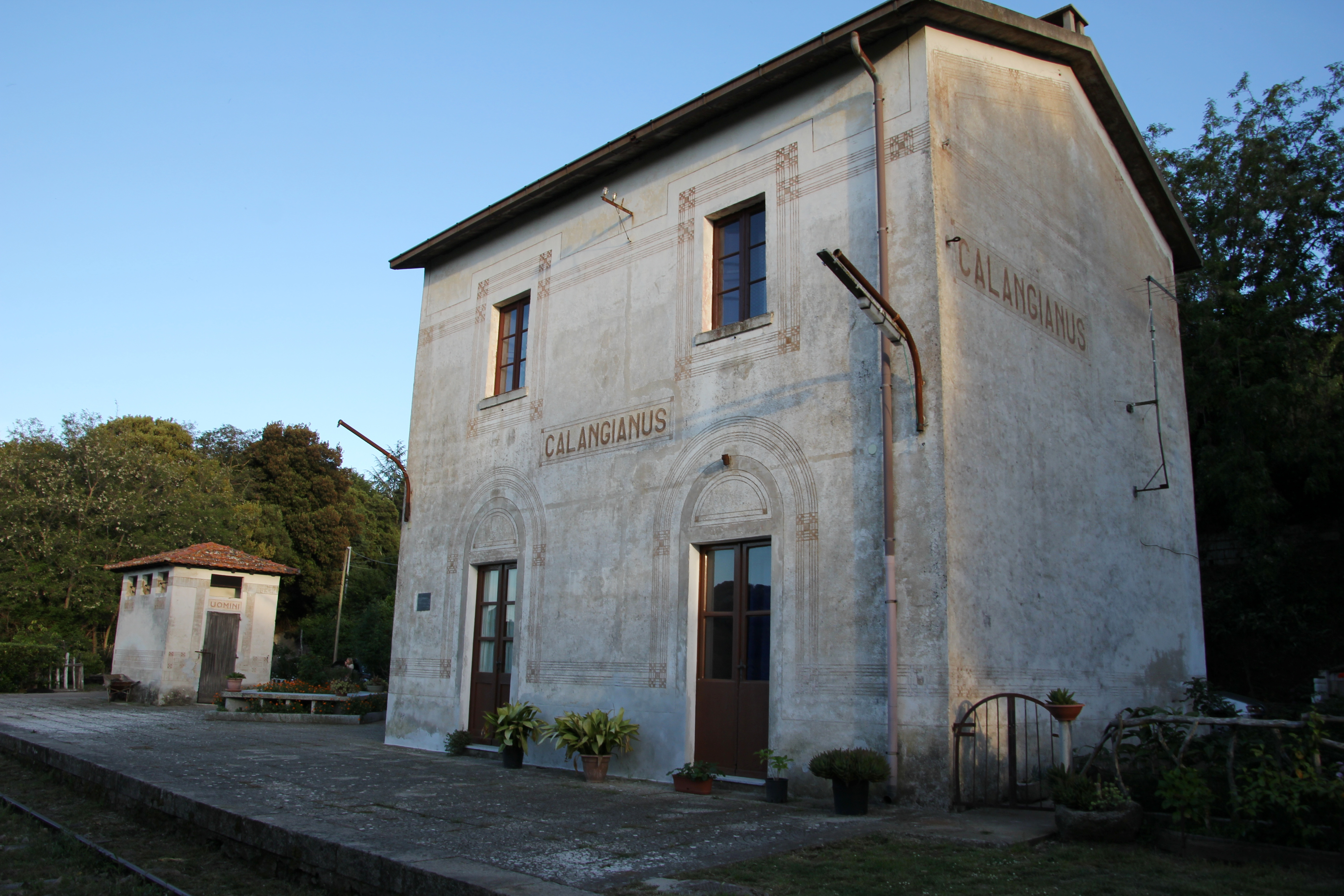 Calangianus - Stazione ferroviaria